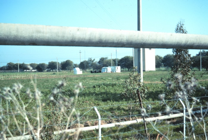 Pipeline